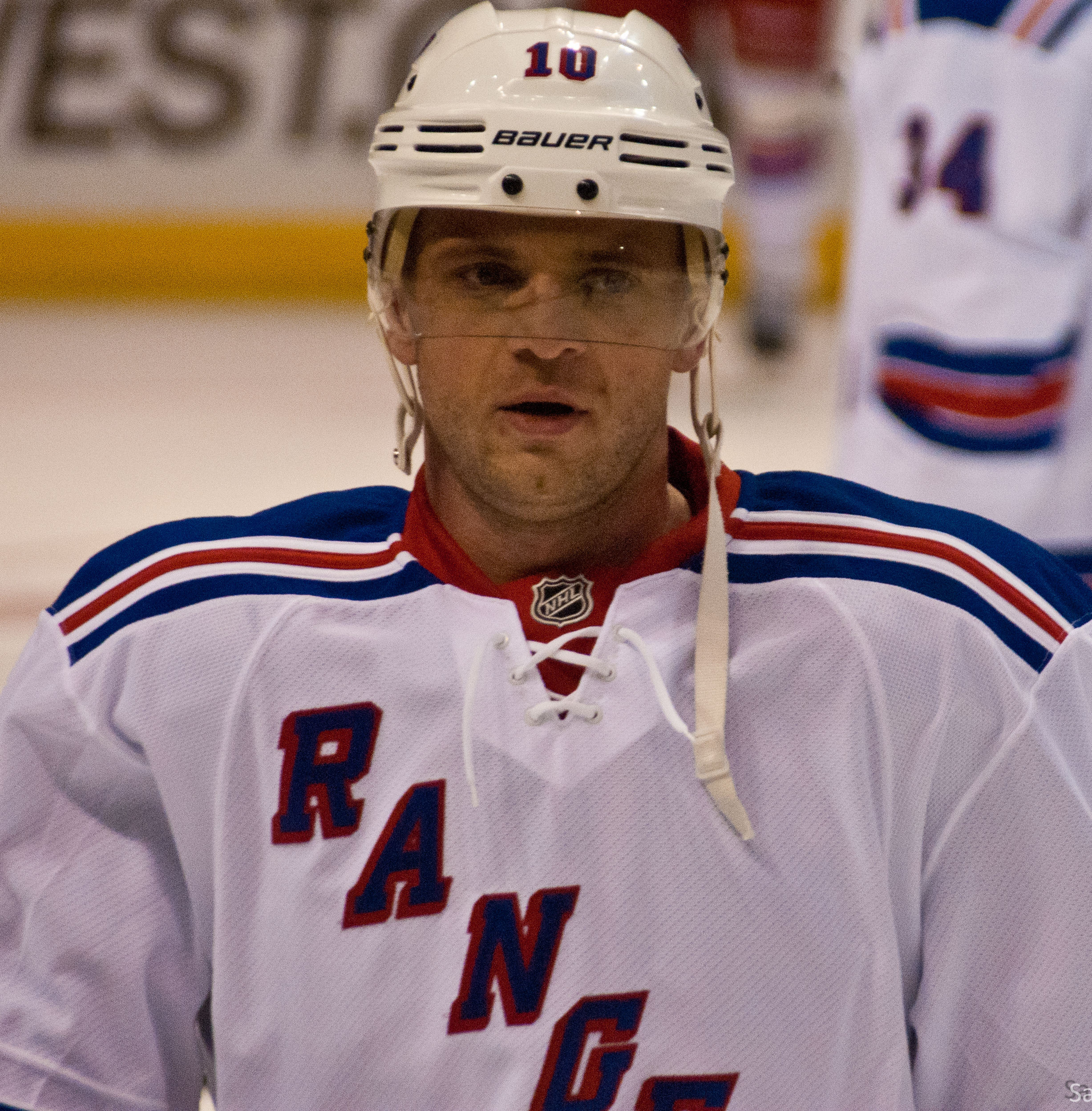 Blues vs. Rangers-8785.jpg